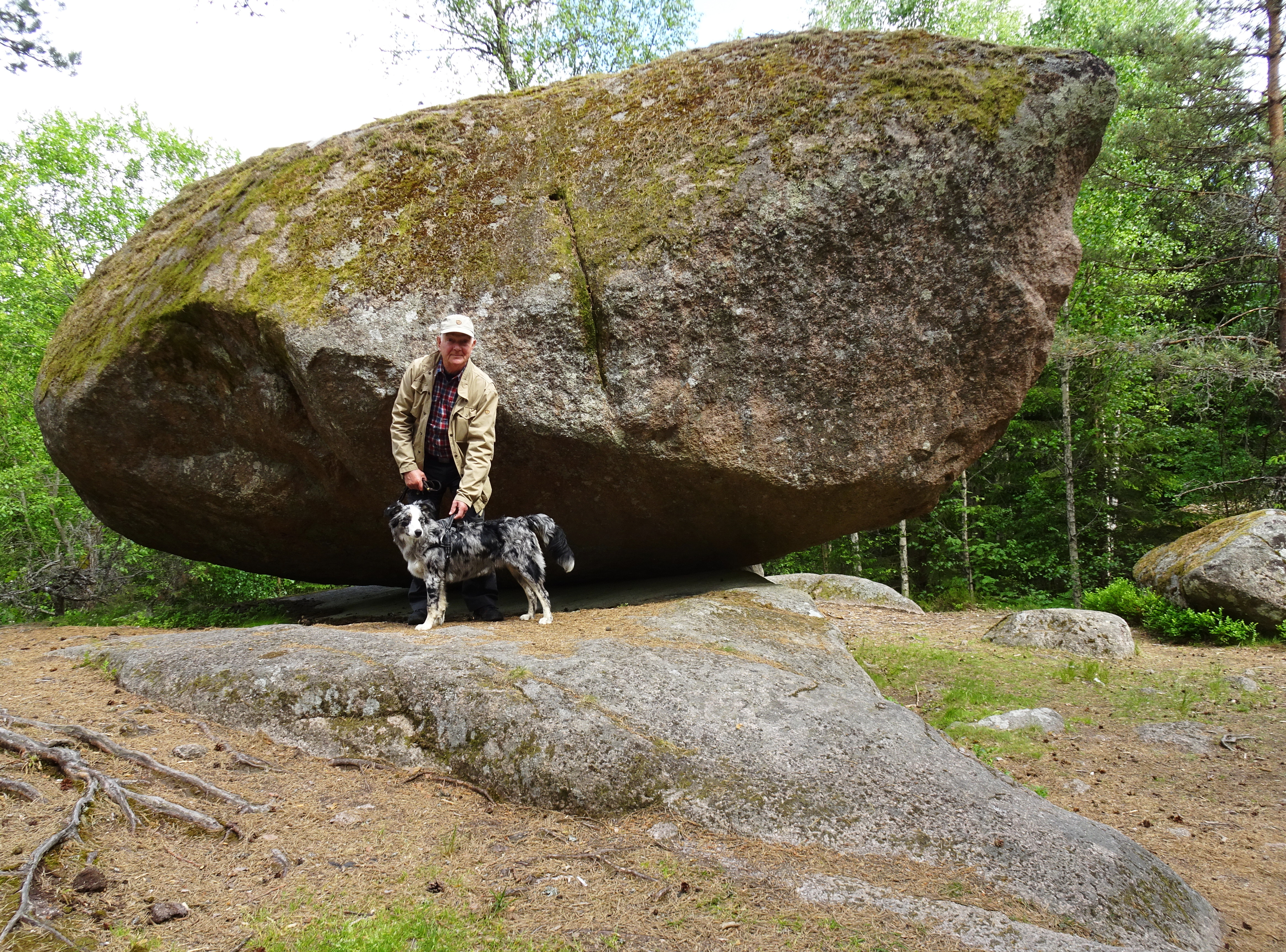 Runkesten, Rumskulla socken (RAÄ-Nummer: Rumskulla 51:1)